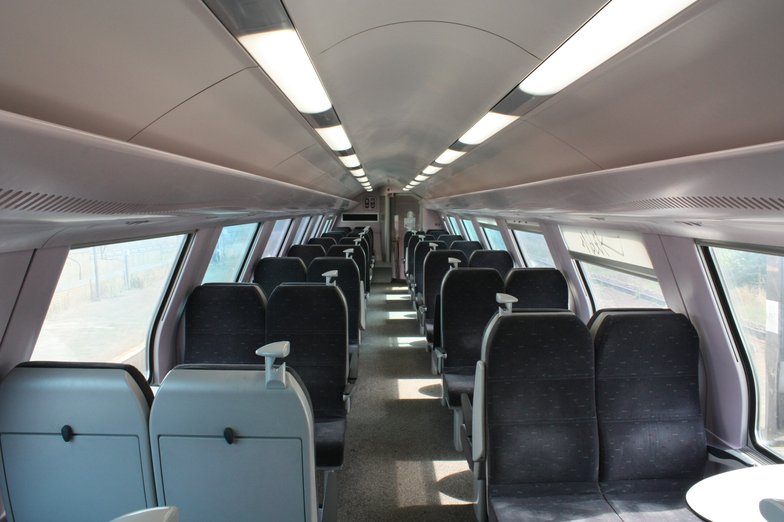 Dit is het interieuer van de bovenverdieping van een M6-rijtuige van de NMBS. Dit is normaal gezien een eerste klas interieur, maar is hier tijdelijk gedeklasseerd.